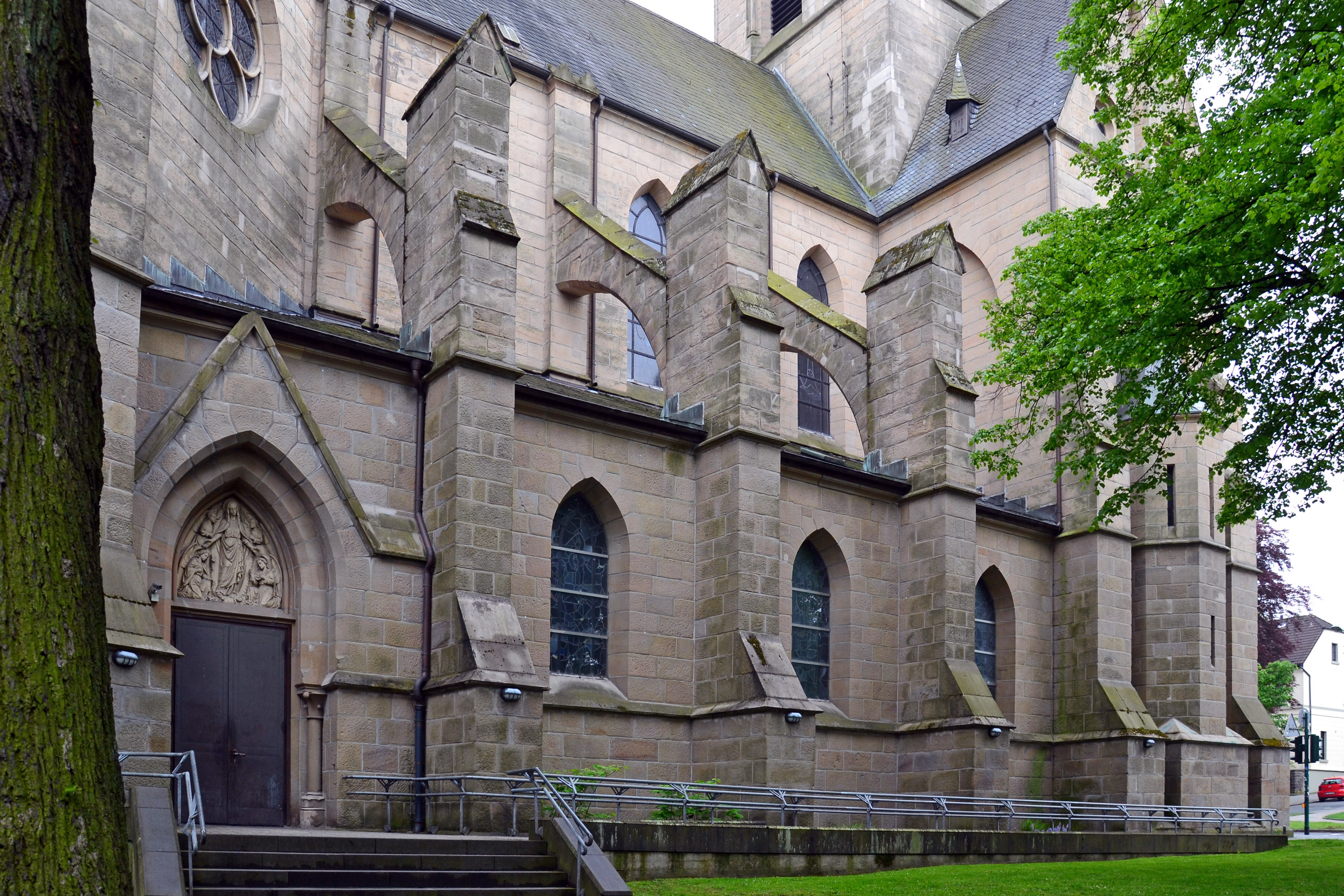 St. Laurentiuskirche in Essen-Steele